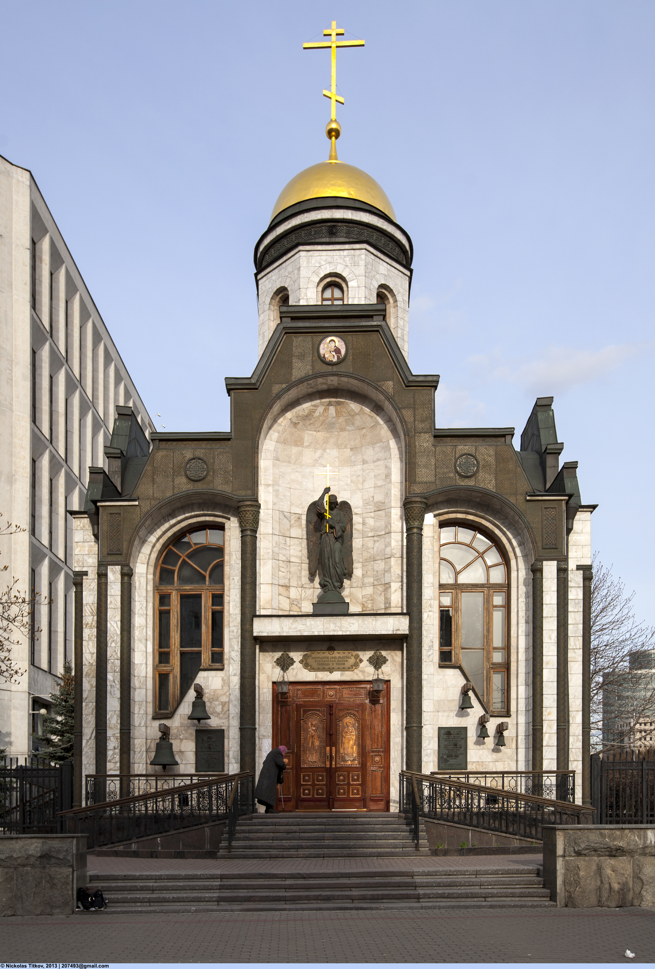 Церковь-часовня Иконы Божией Матери Казанская на Калужской площади. Небольшой одноглавый каменный храм в память сотрудников МВД РФ, павших при исполнении служебного долга. Построен рядом с местом снесённой в 1972 Казанской церкви у Калужских ворот. Освящён 01 июня 2000 года. Карточка храма